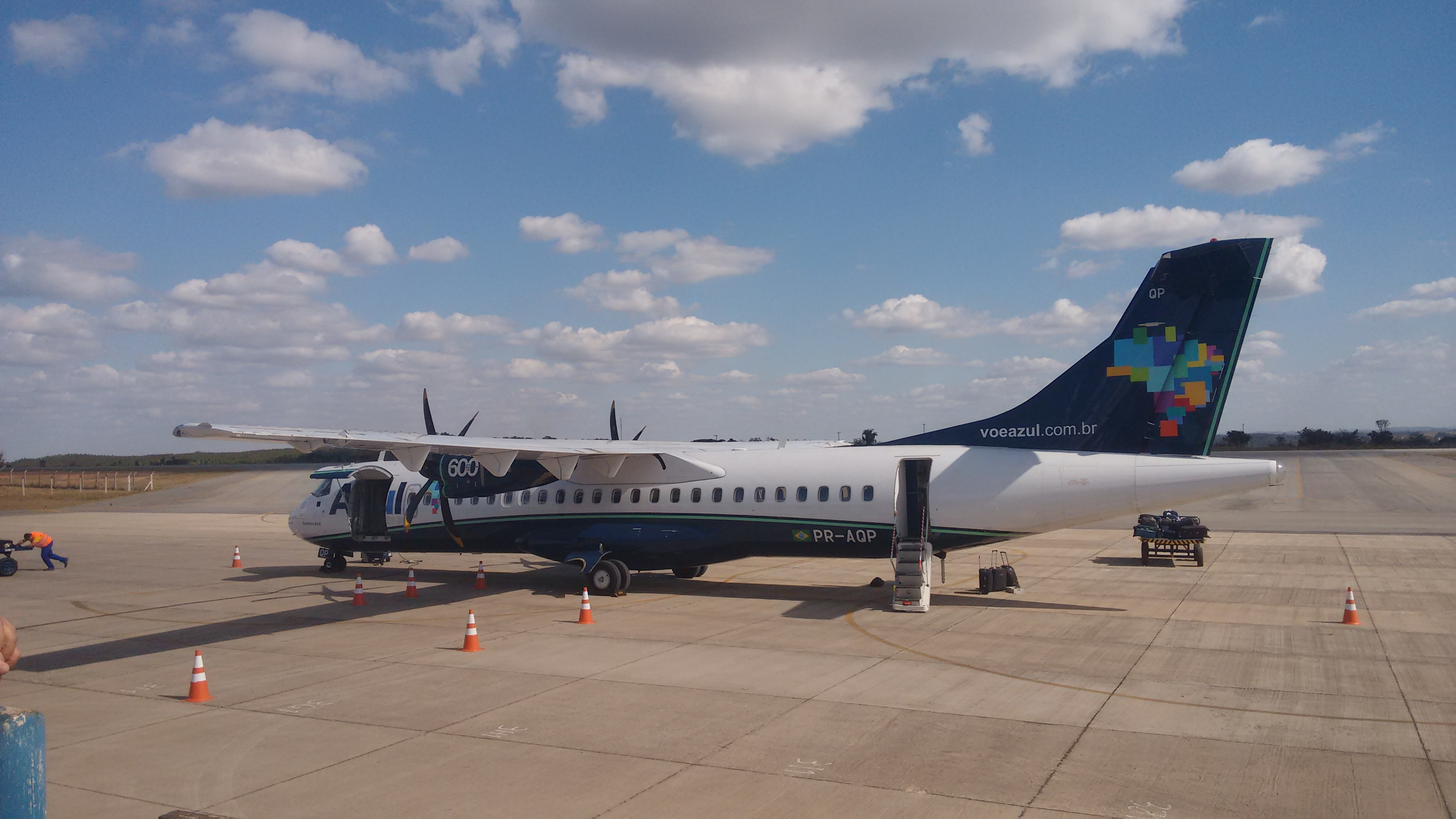 ATR72-600 Azul Linhas Aéreas em Aeroporto Brigadeiro Cabral, Julho de 2015